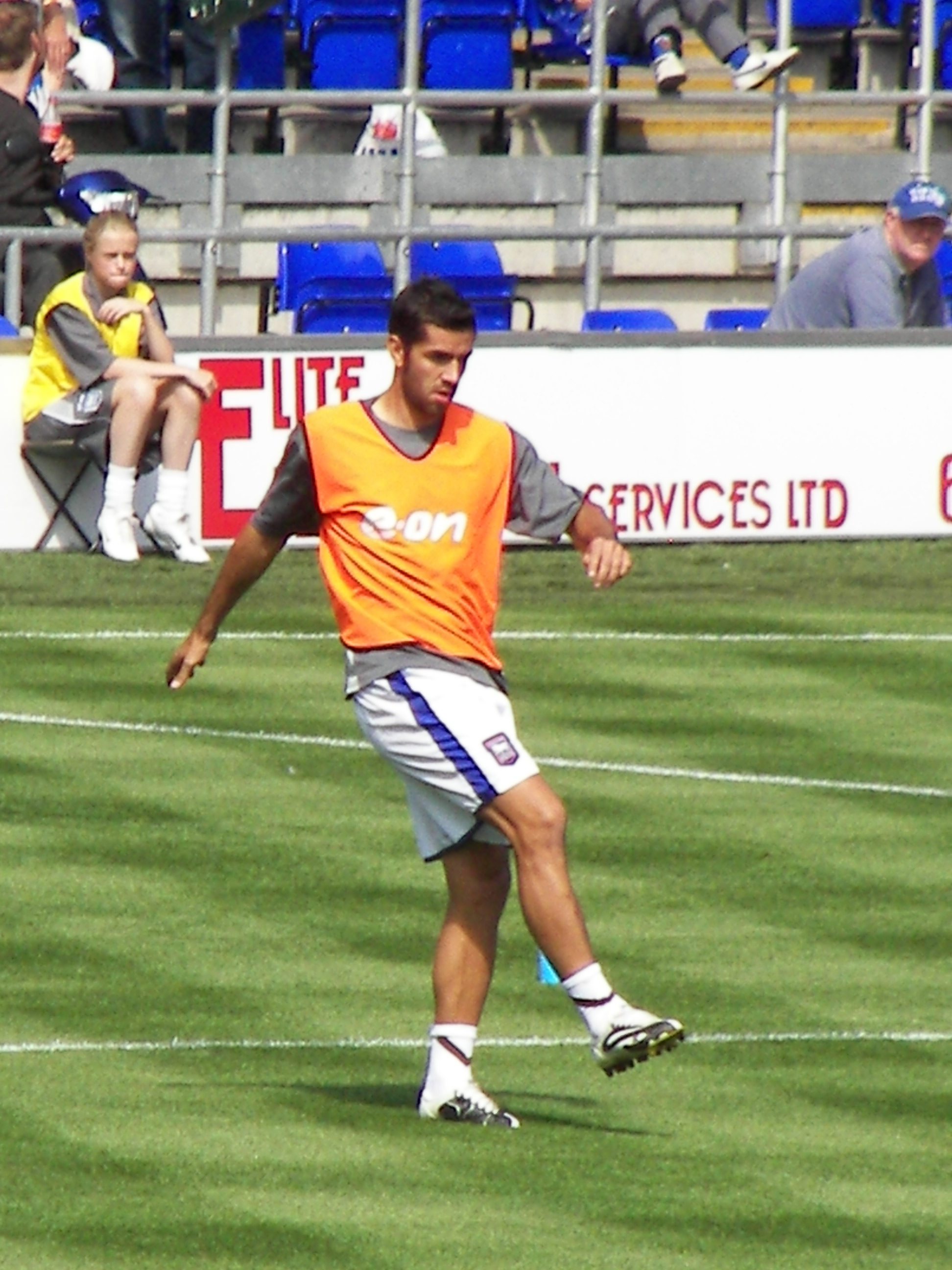 Pablo Counago